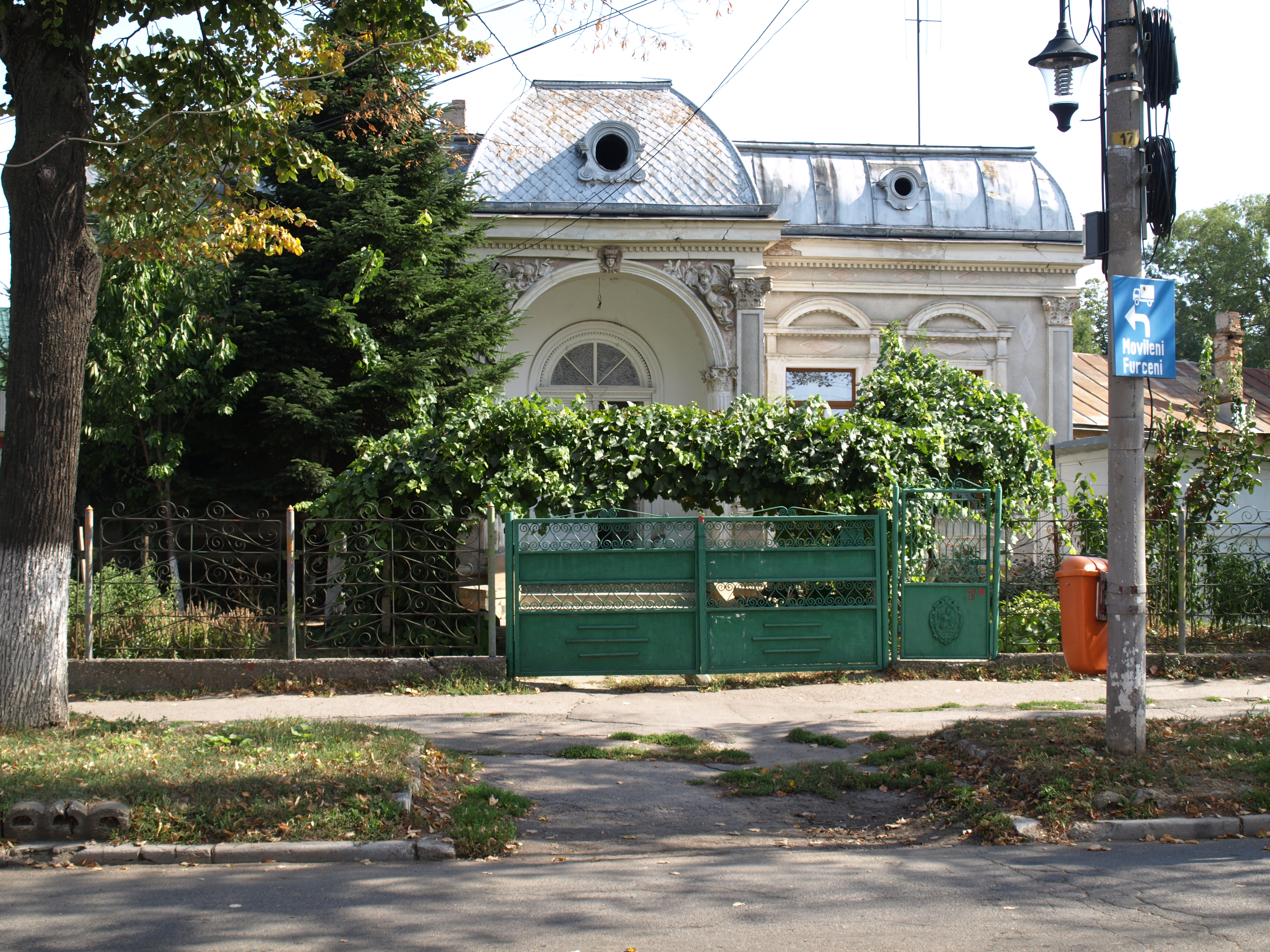 Casă - acum locuinta